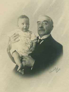 El político y juez chileno Ramón Huidobro Luco (a la derecha) carga a su nieto Ramón Huidobro Domínguez (a la izquierda), nacido en 1916.